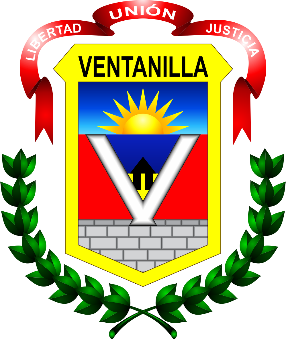 Distrito de Ventanilla - Provincia del Callao